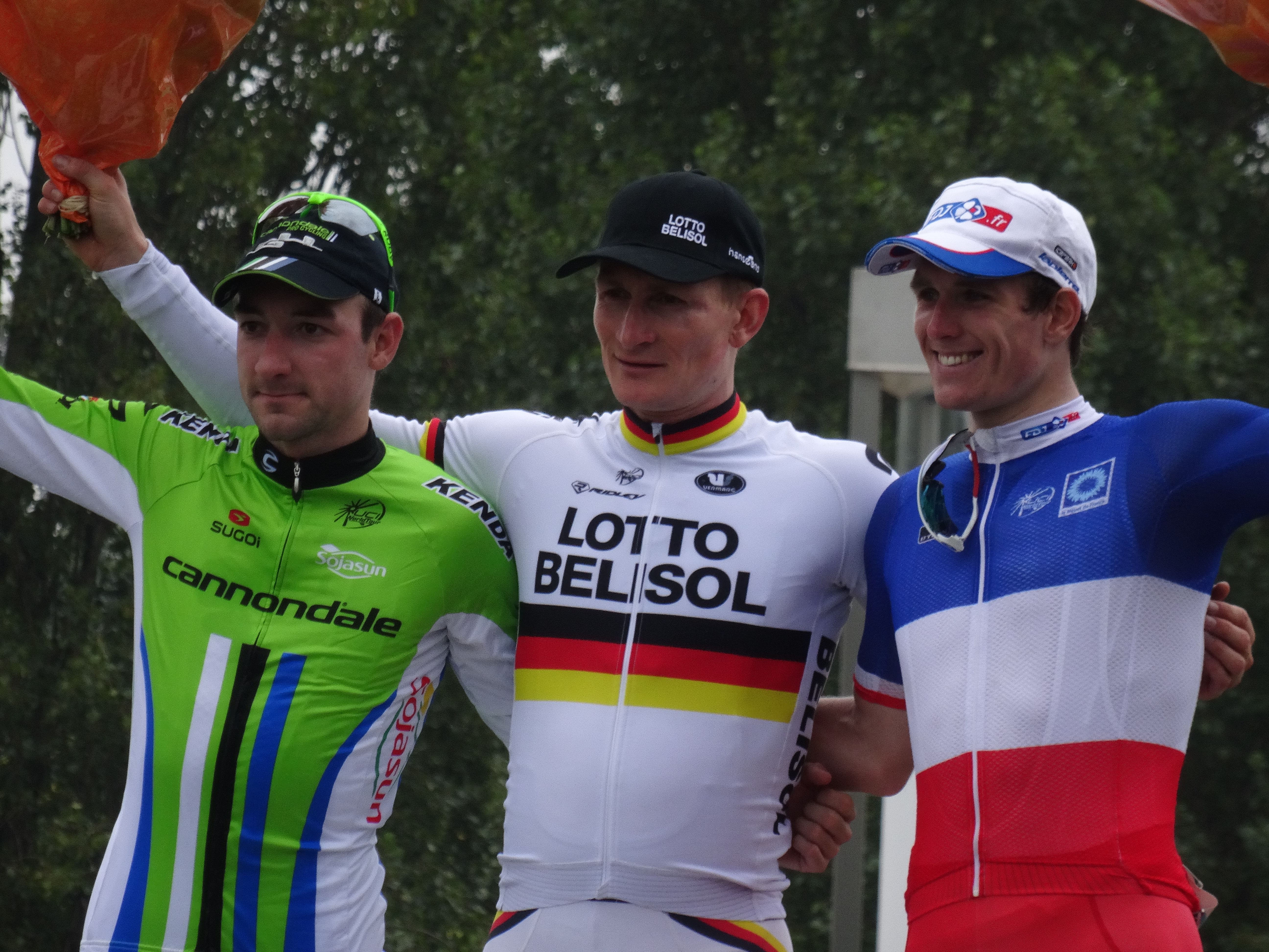 Brussels Cycling Classic 2014.